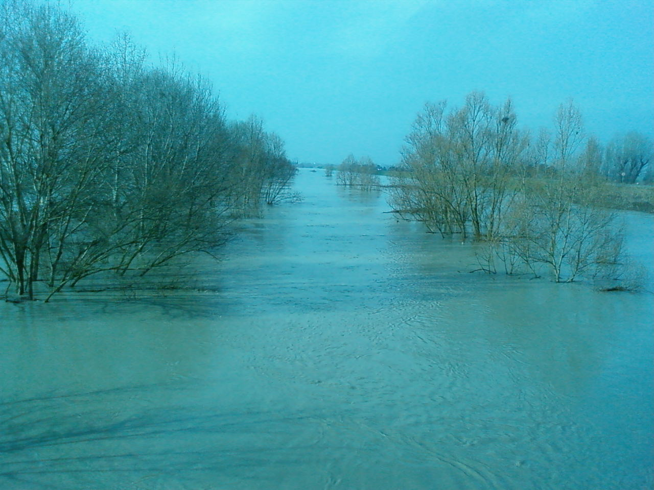 Il fiume Reno in piena all'altezza di Molinella il 22 Gennaio 2009